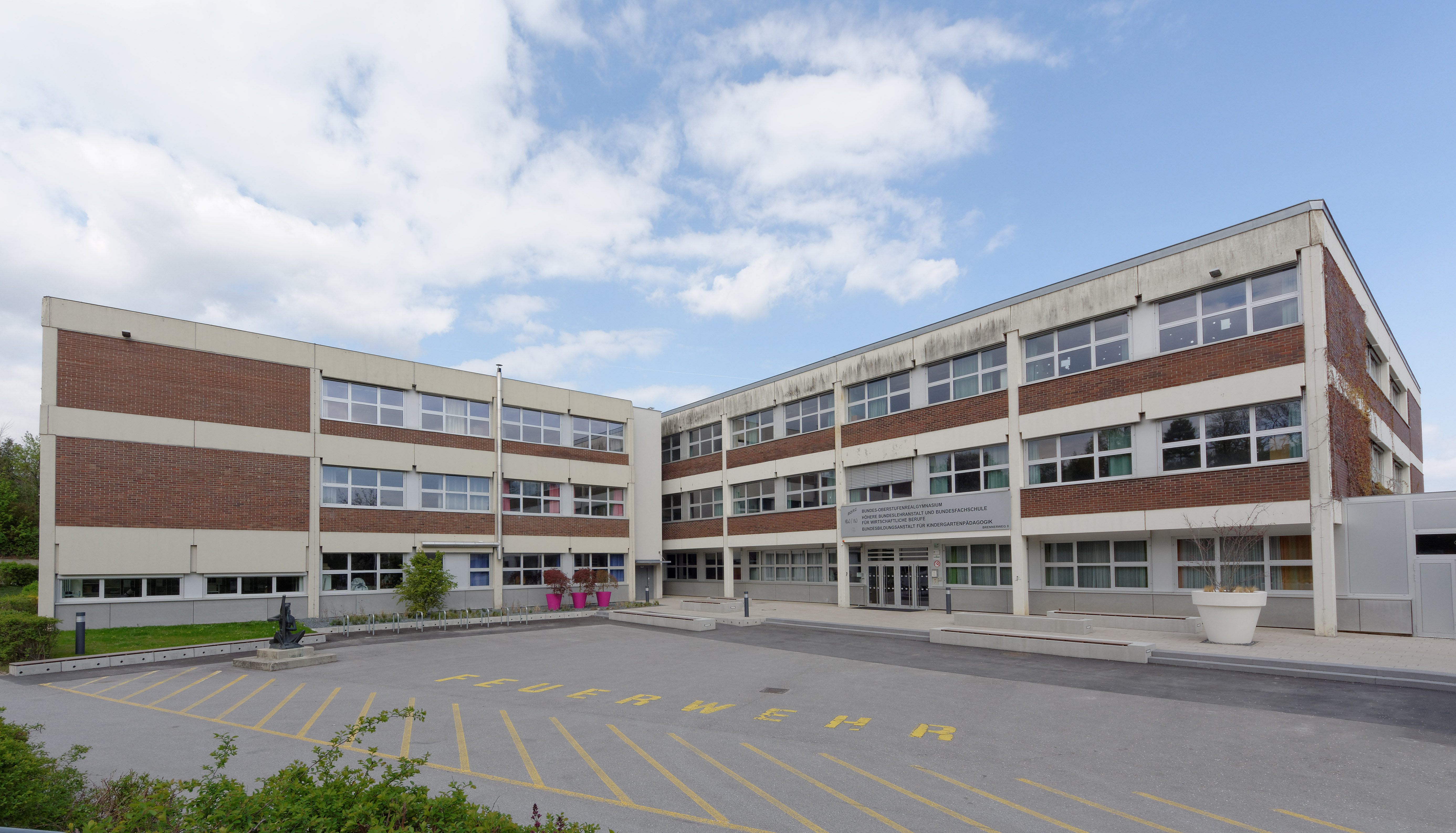 Bundesoberstufenrealgymnasium in Mistelbach, Niederösterreich, Österreich